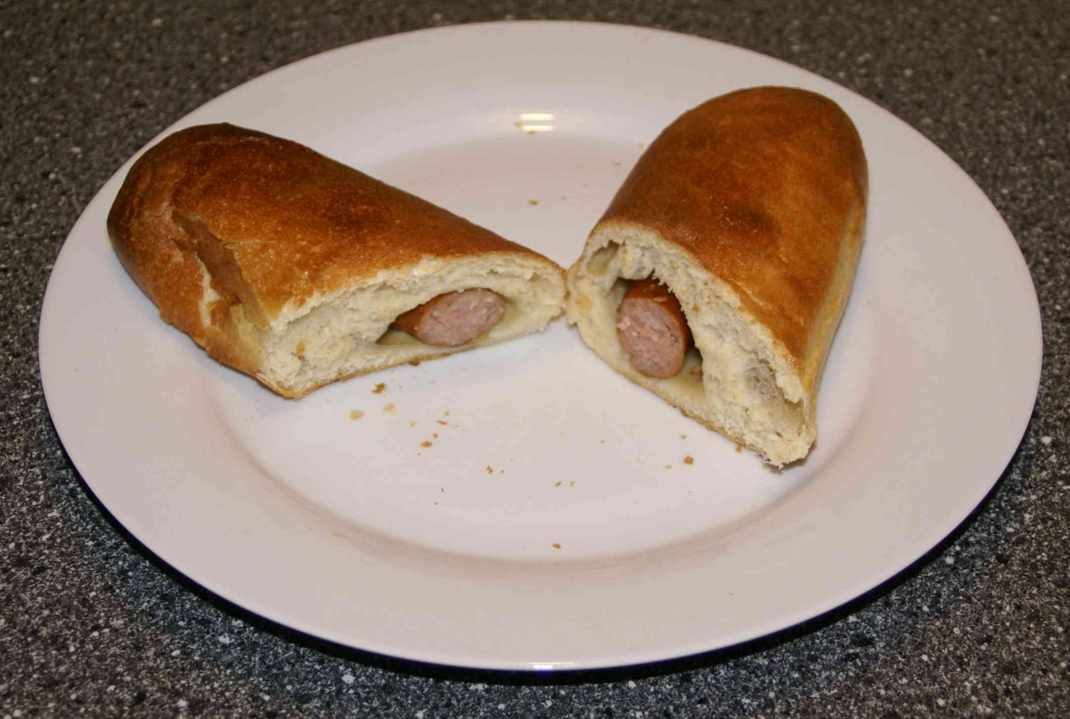 Wursthuller, geschnitten